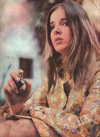 Marilina Ross, cantante y actriz argentina.